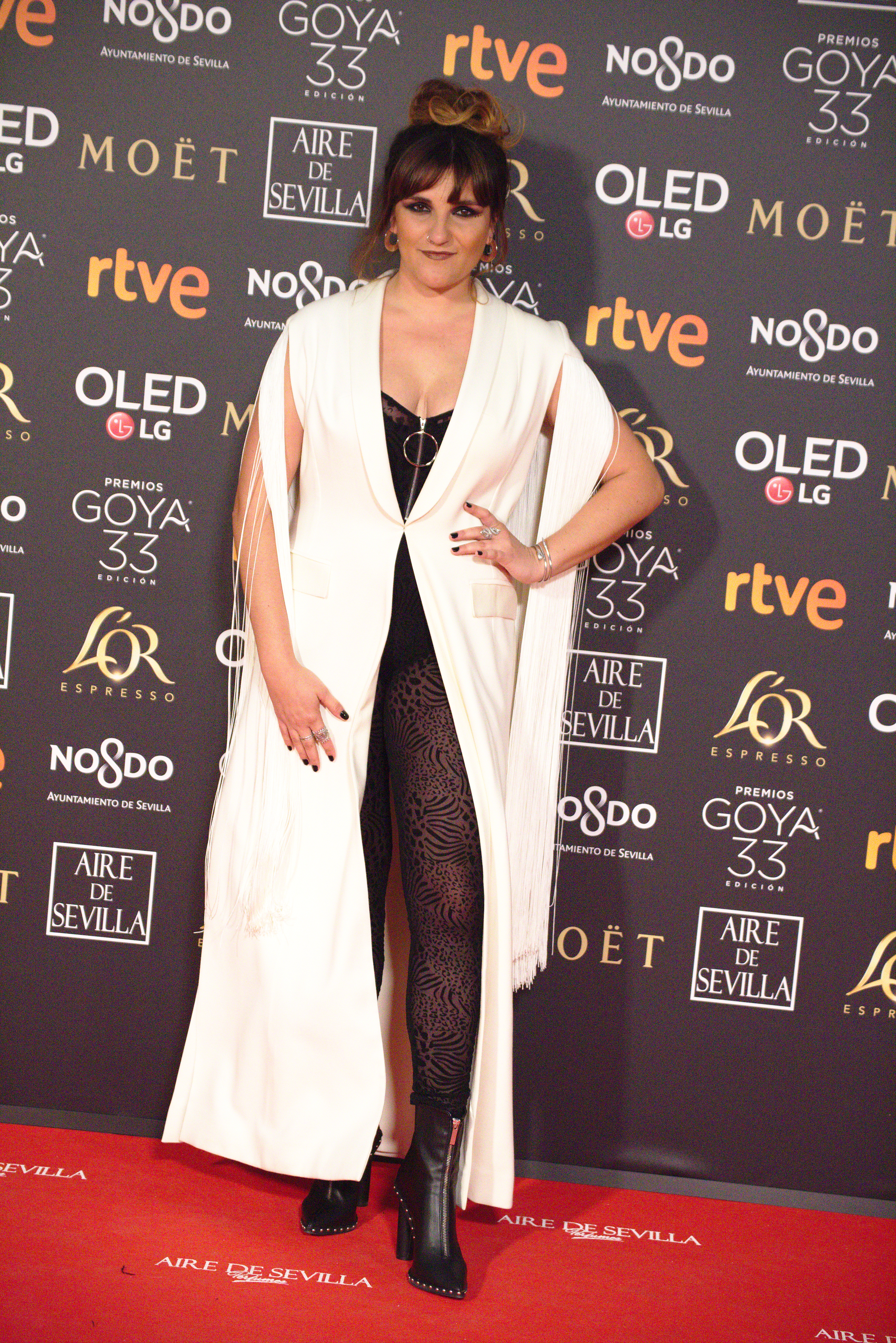 Rozalen en la alfombra roja de los Premios Goya celebrados en Sevilla en Febrero 2019